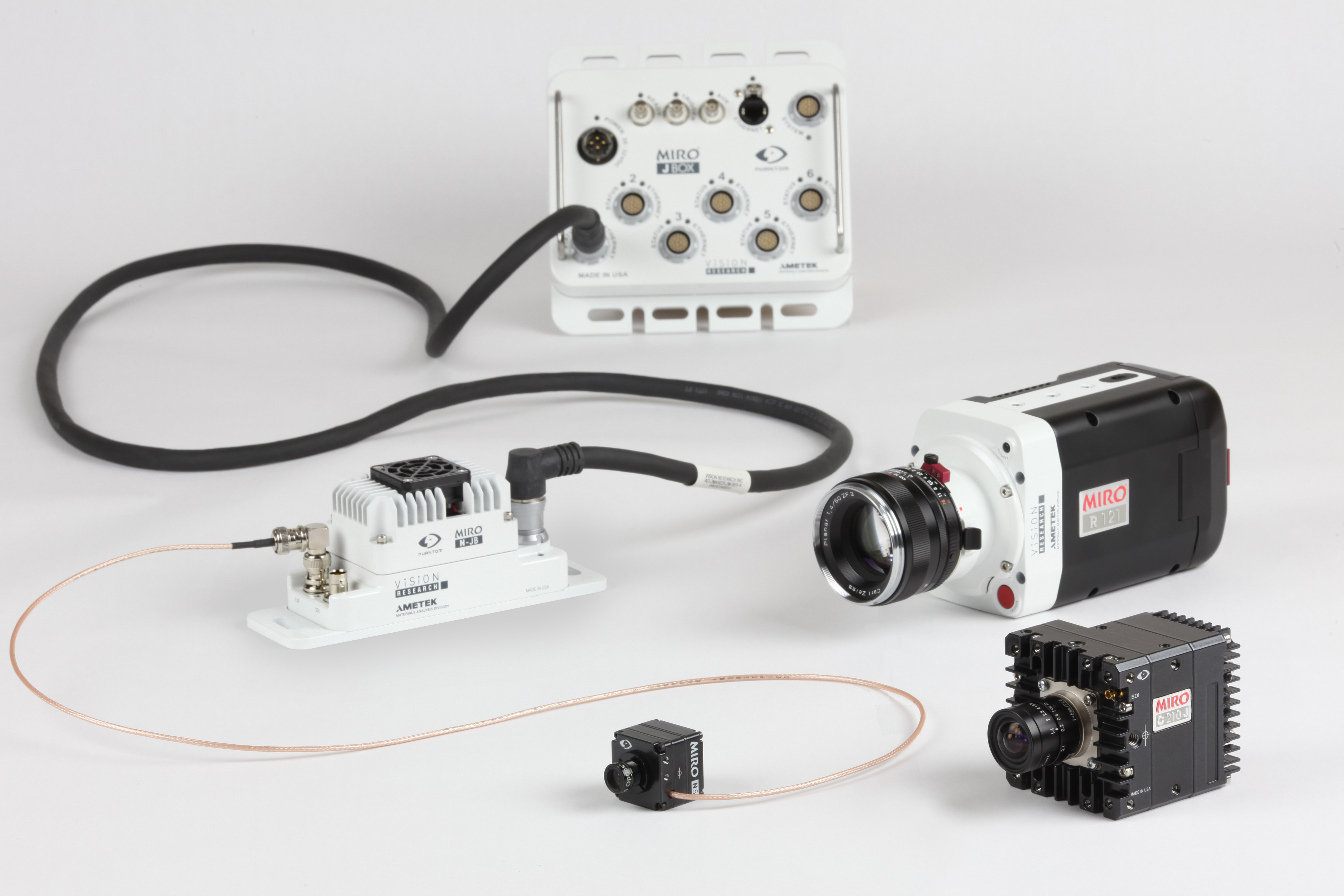 Sérié Phantom Miro R, C & N